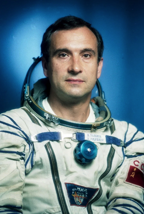 Валерий Владимирович Поляков (род. 1942) — лётчик-космонавт СССР, Герой Советского Союза и Герой России